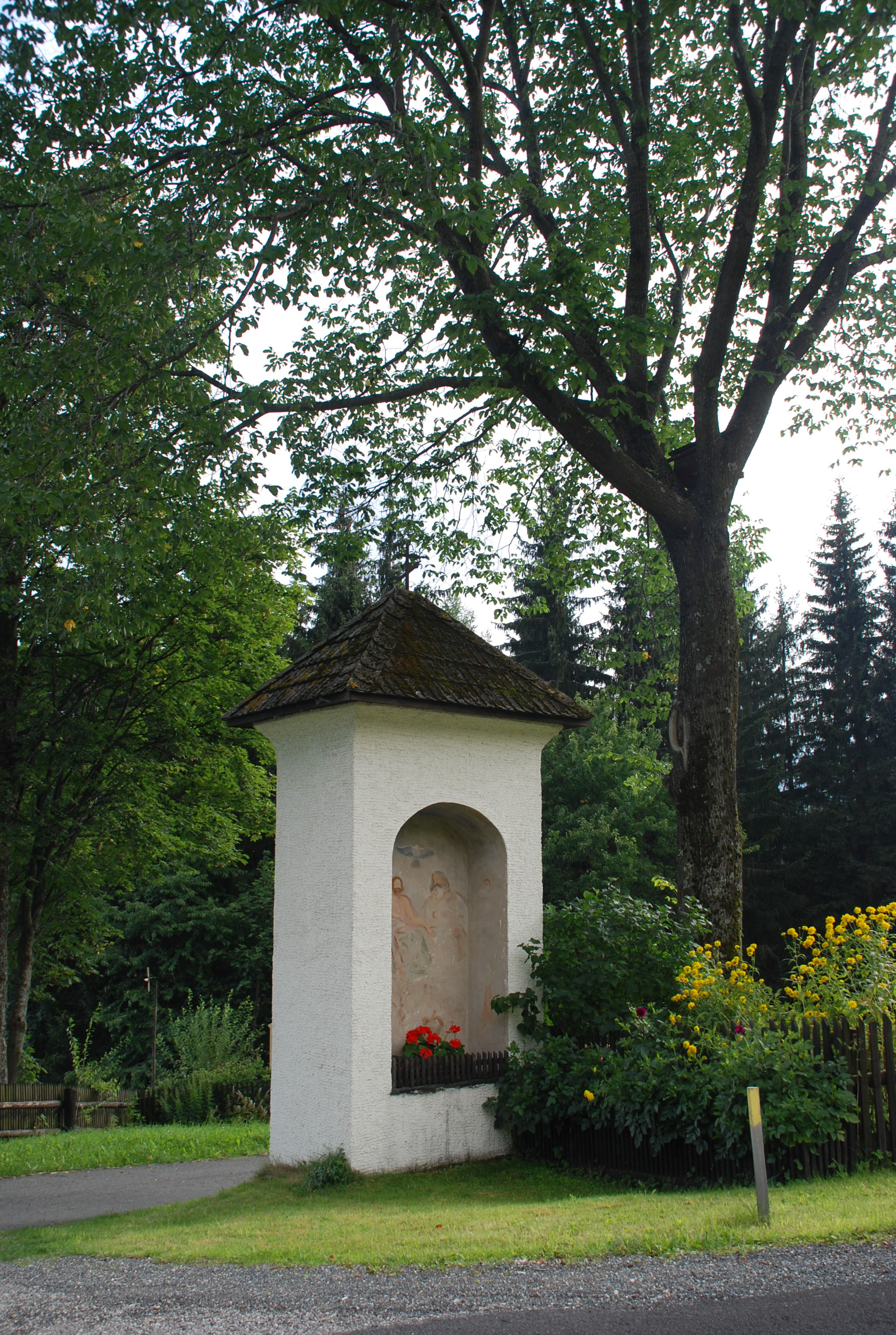 Kapelle bei der Wegverzweigung beim Gratzen in Rettenbach